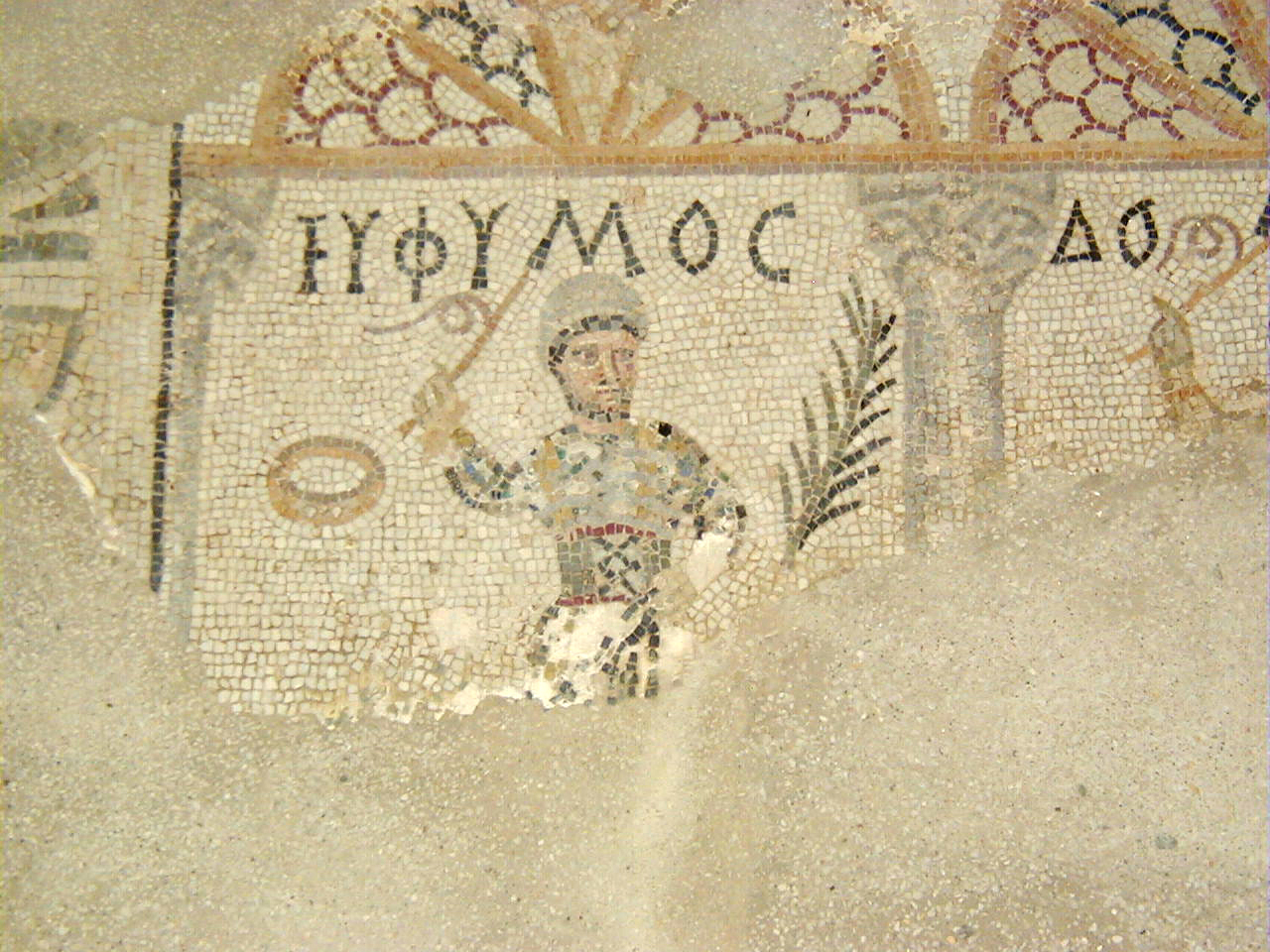 mosaïque inscription grecque, musee paléochrétien